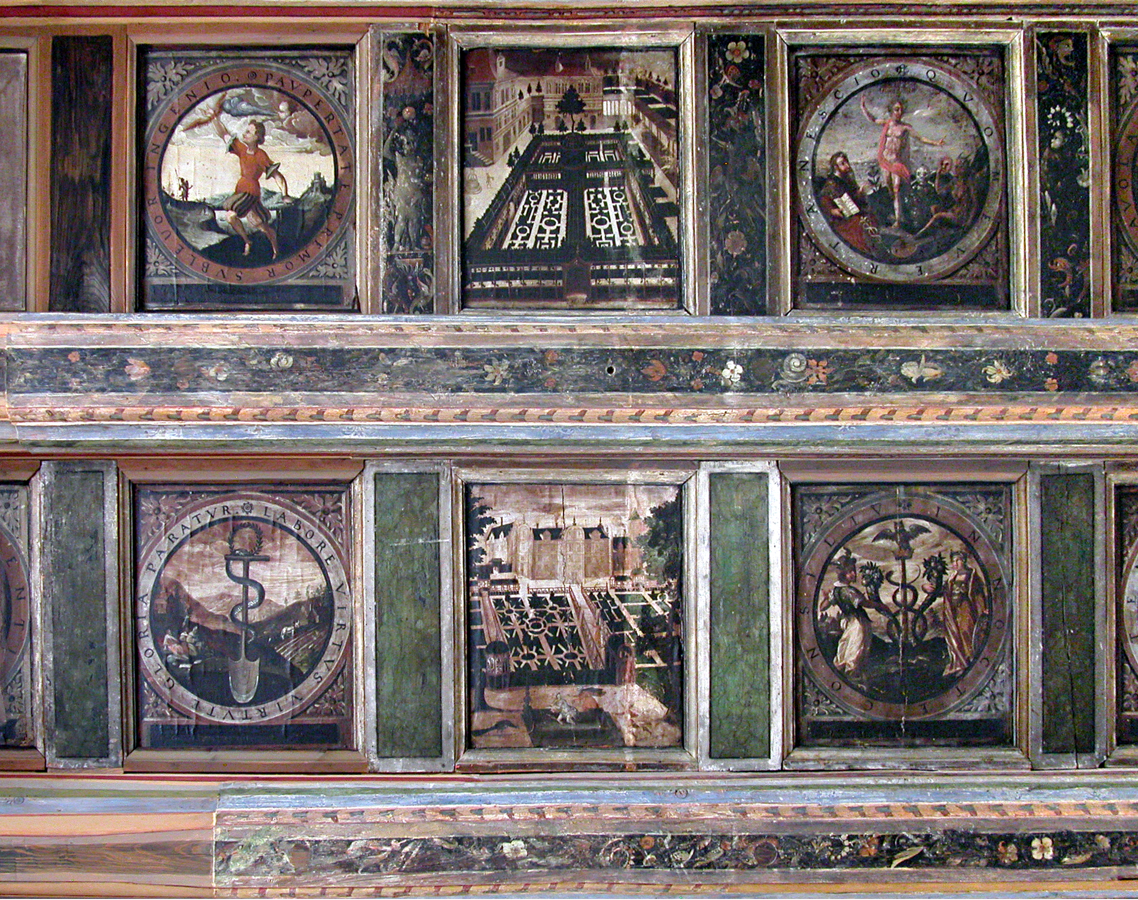 08.10.2006 04758 Hof (Naundorf bei Oschatz): Altes Schloß (um 1540). Heute Gemeindeverwaltung. Renaissancedecke im Festsaal im Obergeschoß. Die Bilder in den Kassettenfeldern sind auf Leinwand gemalt. [DSCN11107.TIF]20060810300DR.JPG(c)Blobelt